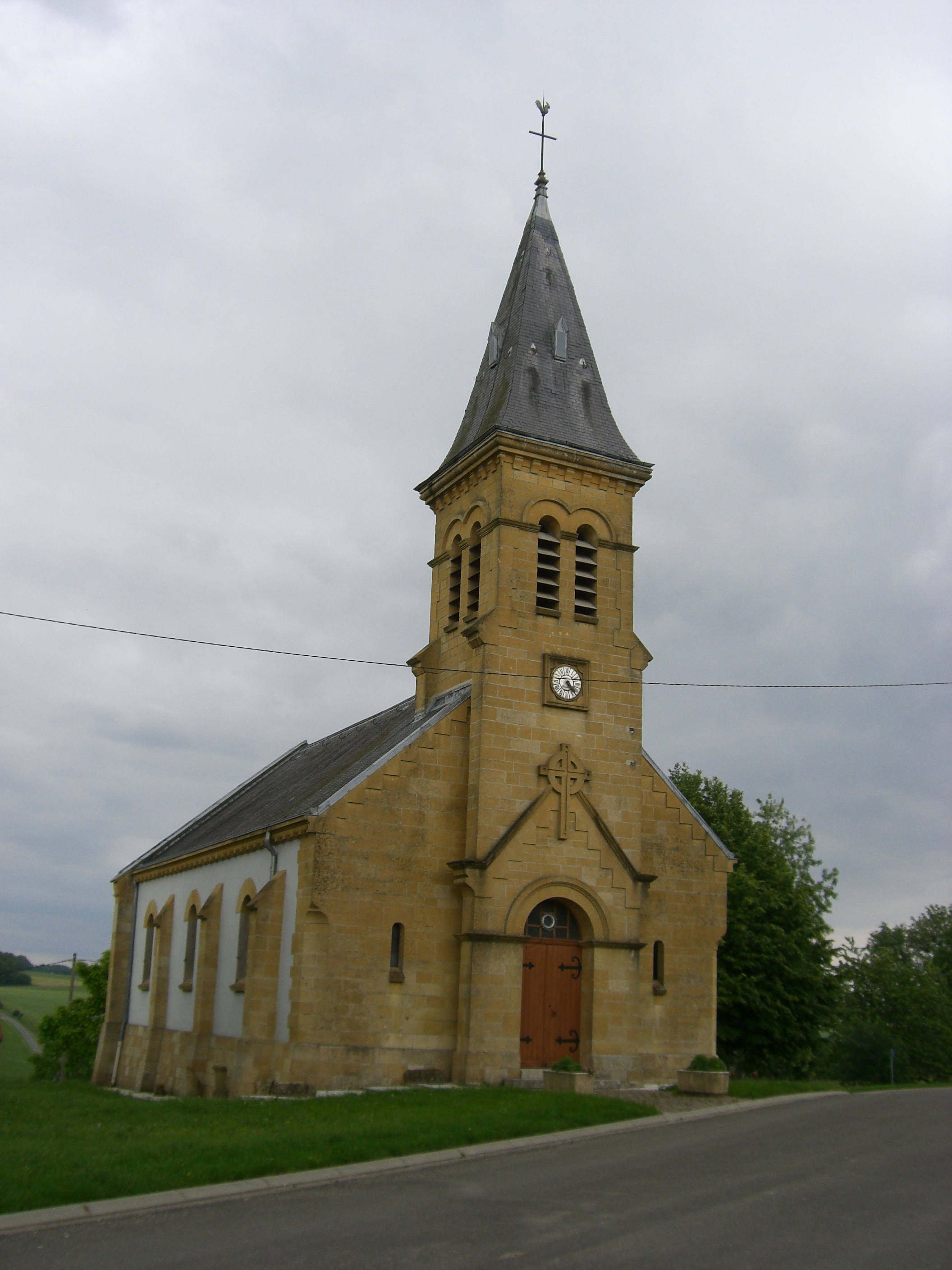 Eglise de Champigneulle (Ardennes, France)